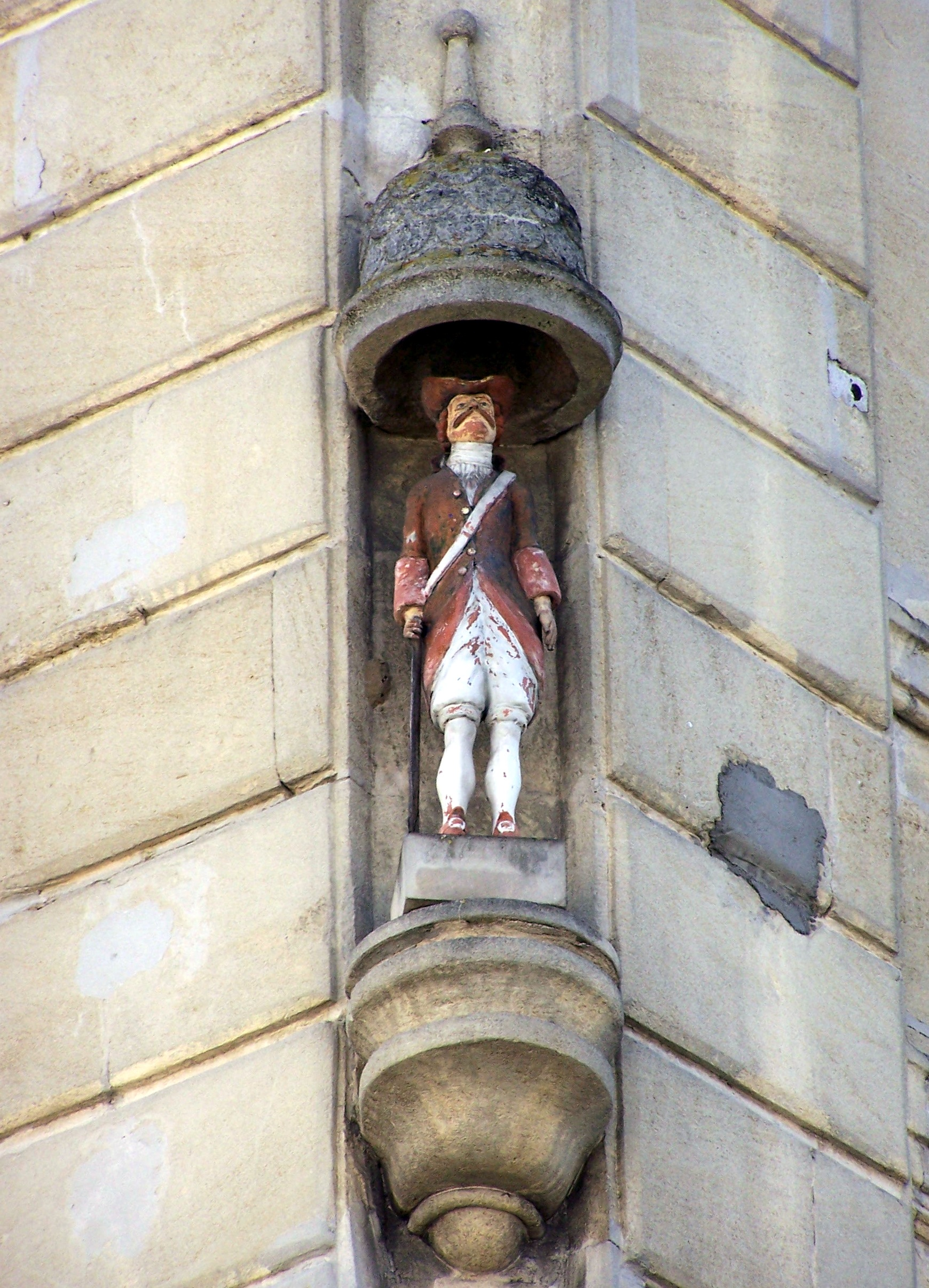 Statue de Jean de la Réoule à La Réole, Gironde, France, place de la Libération